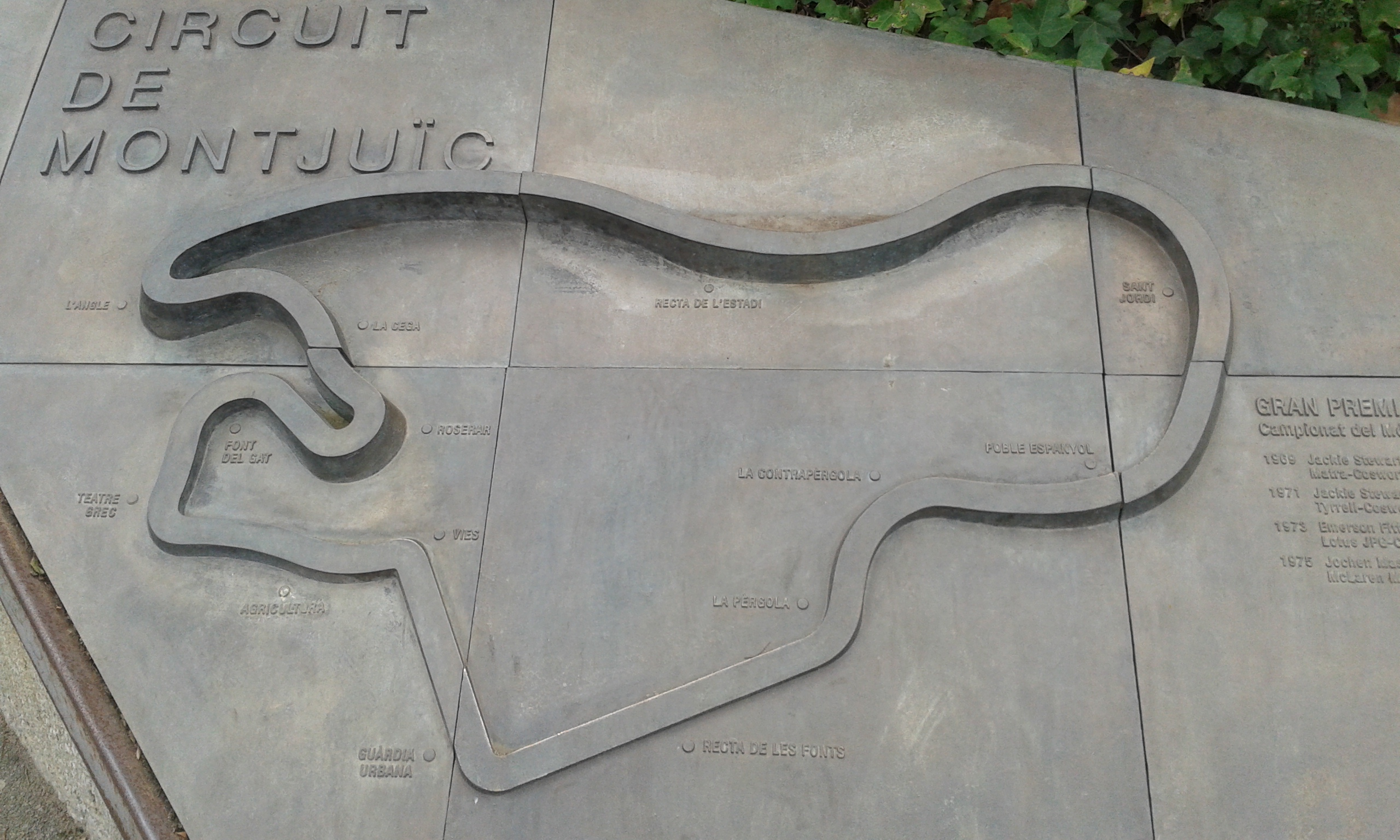 Circuito del Monjtuic